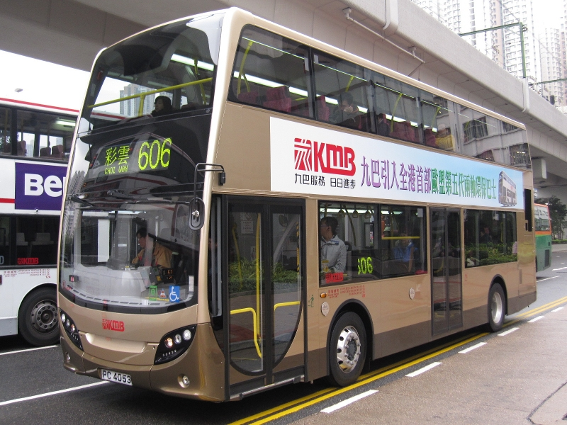 九巴首部Alexander Dennis Enviro 400 低地台雙層空調巴士(ATSE1 / PC4053)，攝於鯉魚門道觀塘法院外